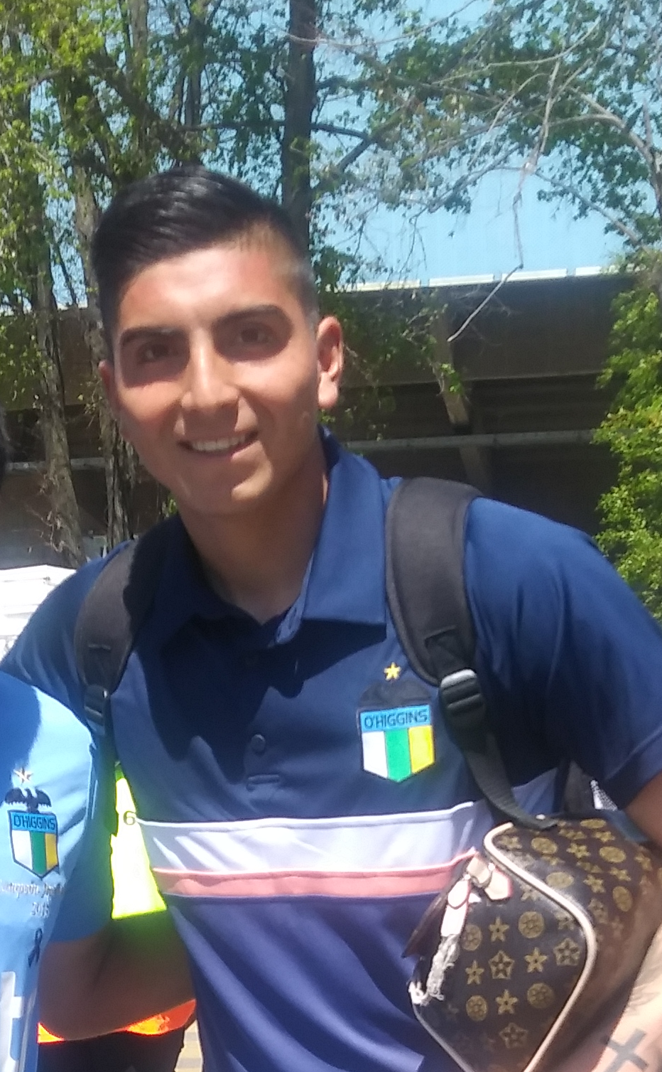 Luis Ureta, futbolista chileno